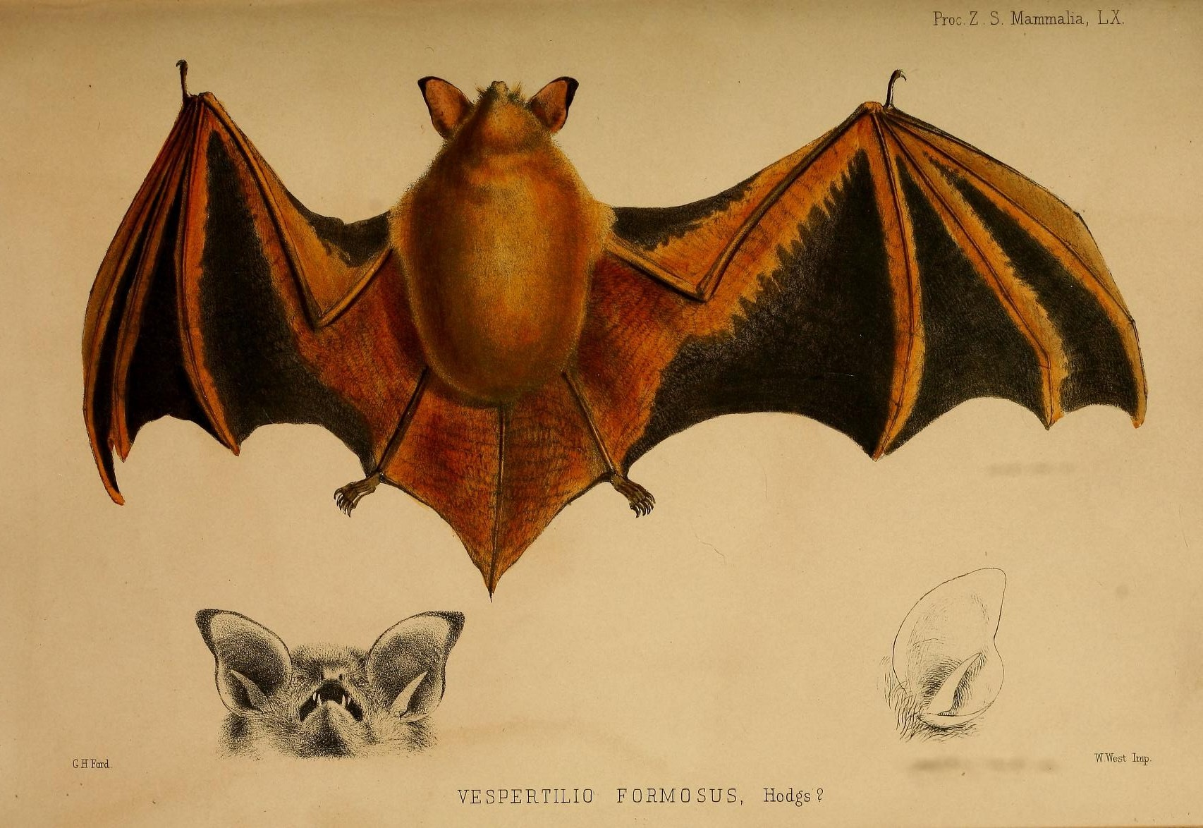 DO CO a a pri en W l.